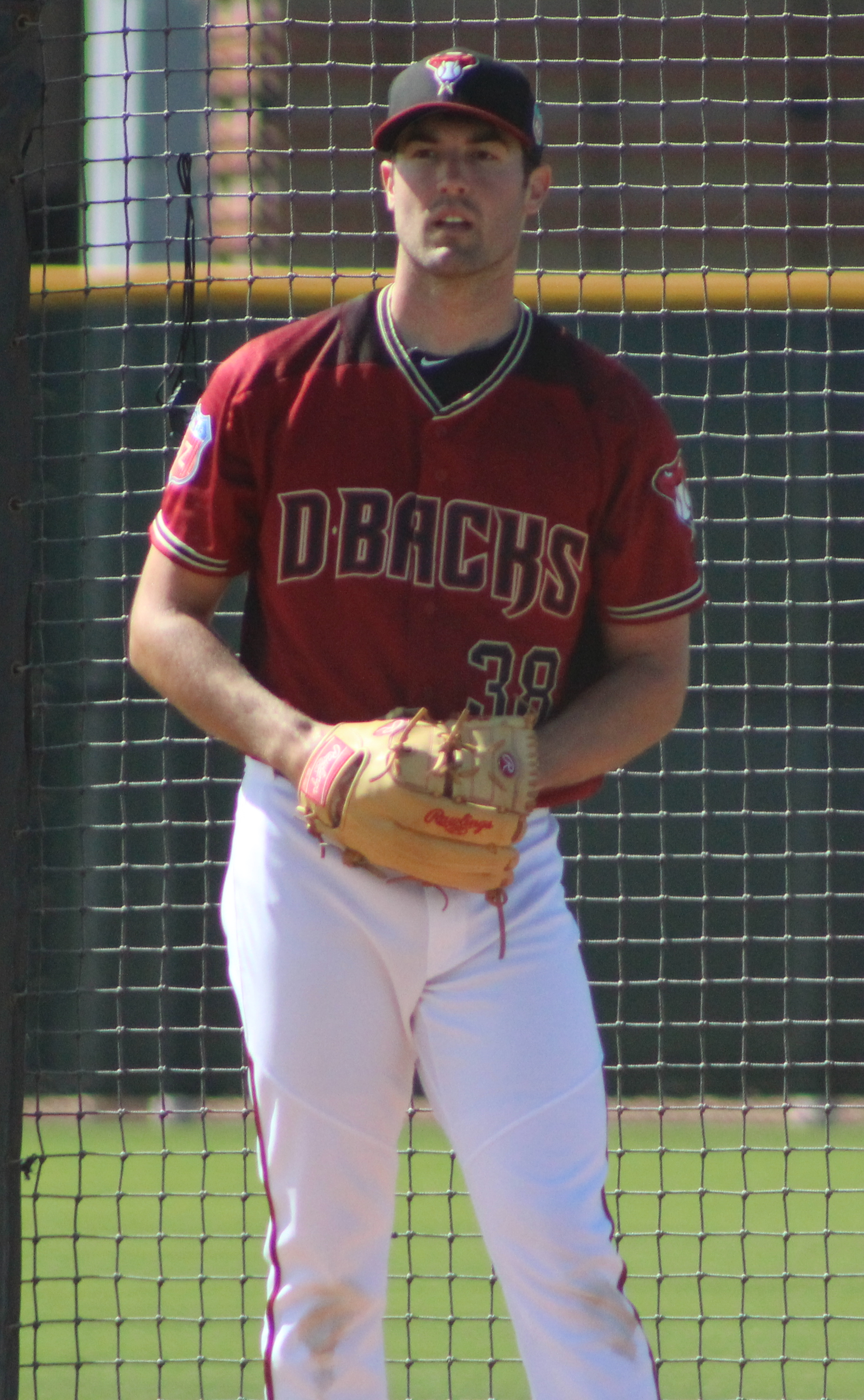 Robbie Ray